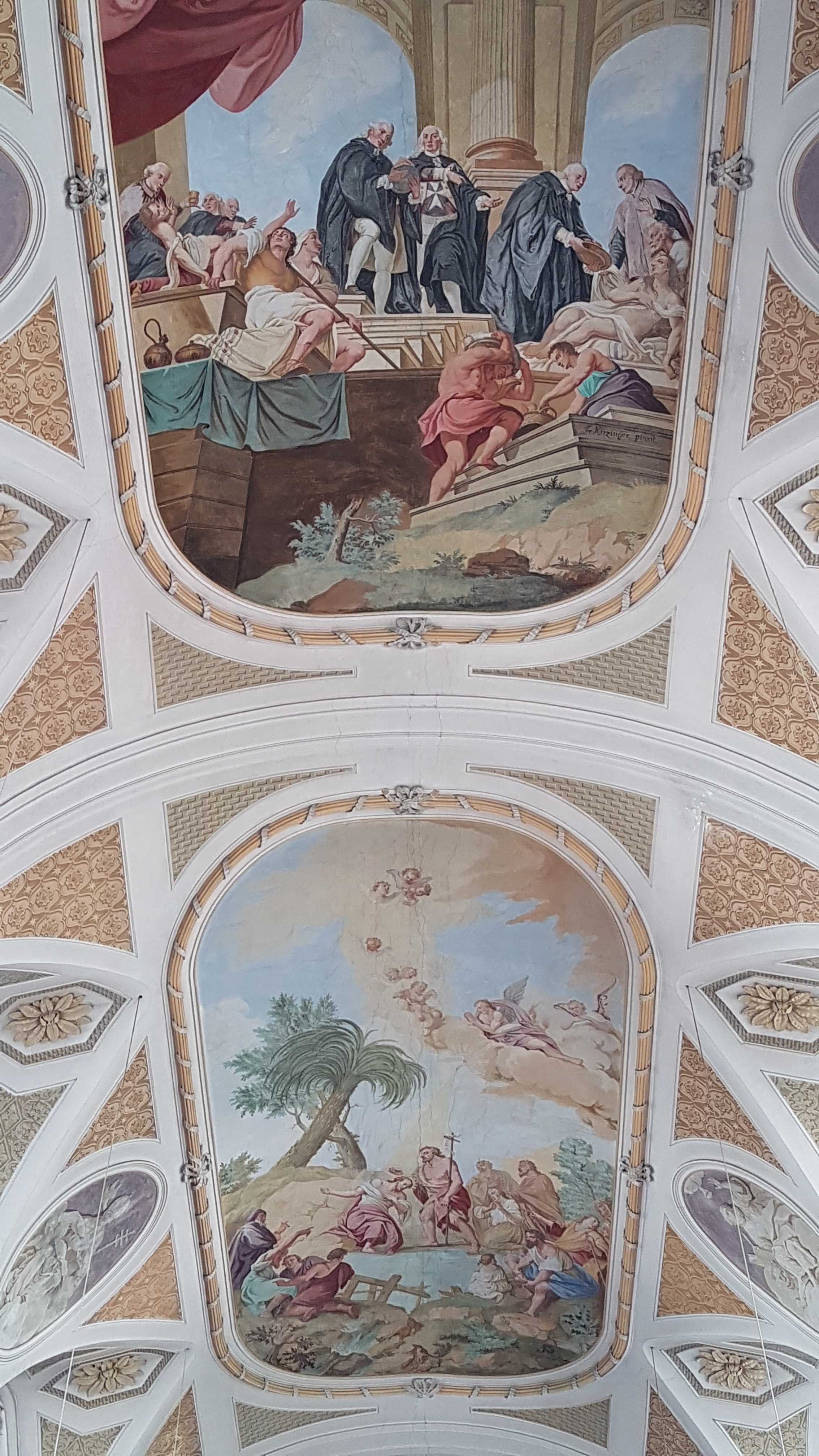 St. Sebastian (Ebersberg), Langhaus-Mittelschiffgewölbe